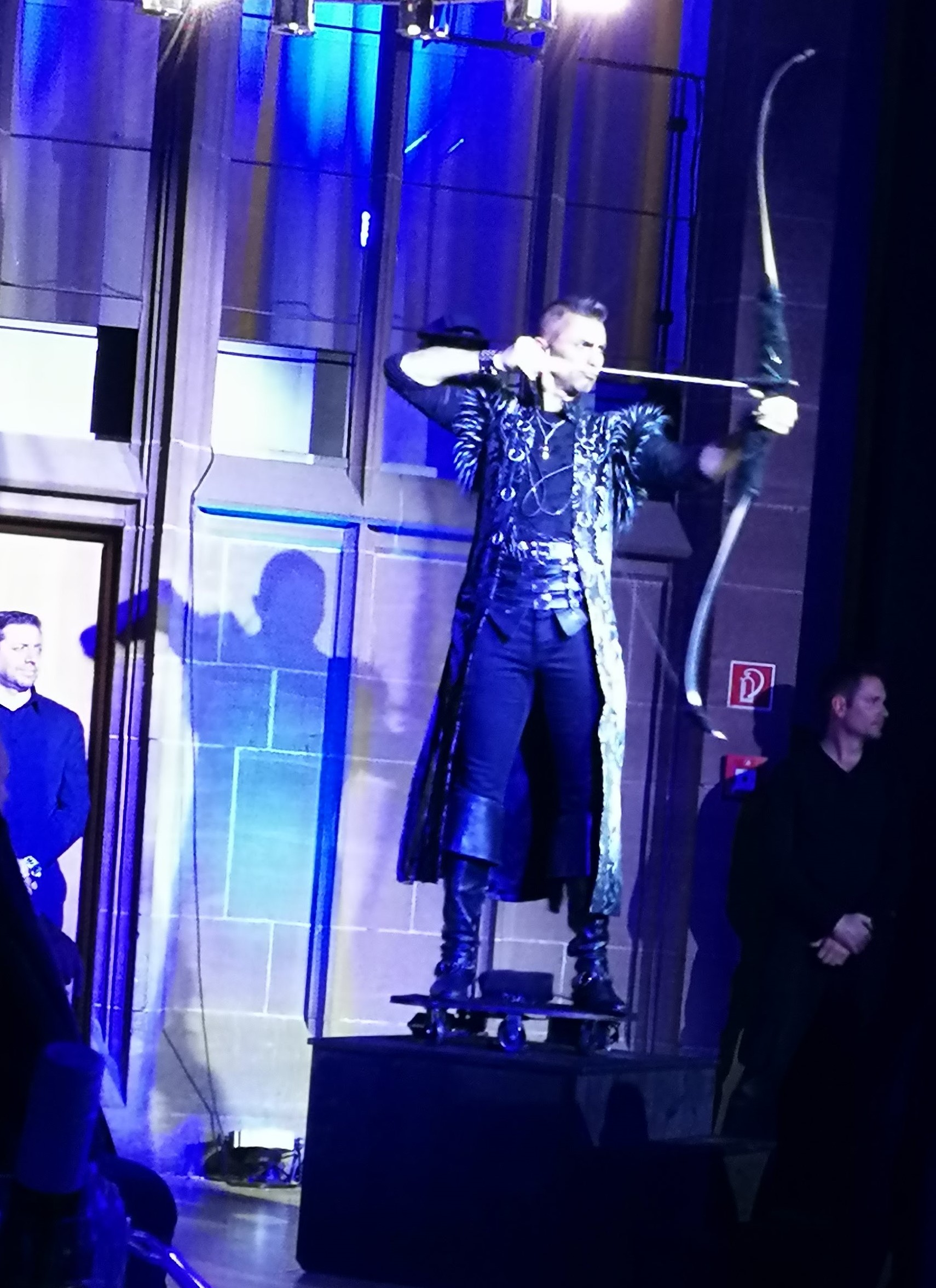 Aaron Crow Bowman Wintervariete Heidelberg 2017